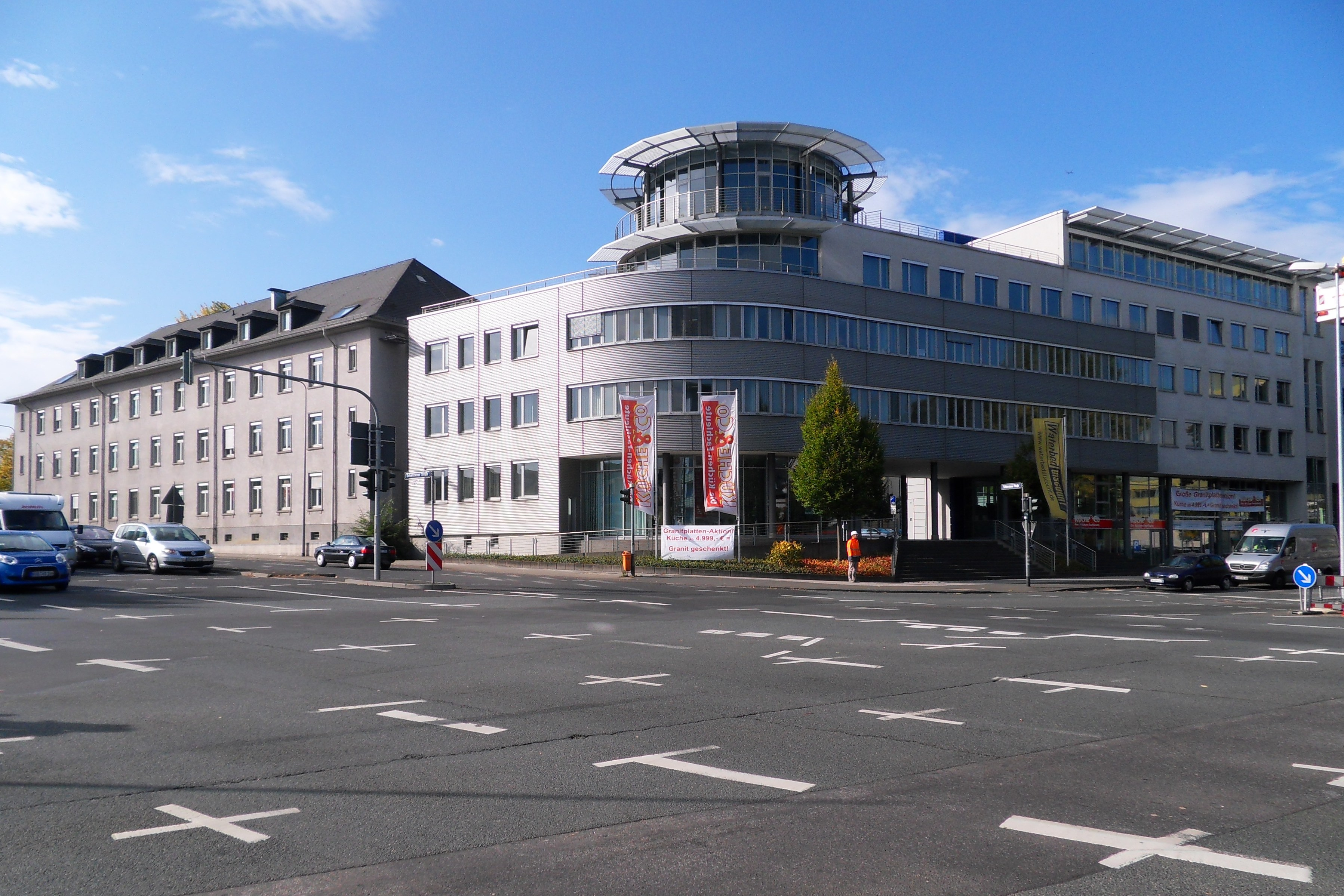 Das Europahaus als Pädagogisches Haus Wiesbaden im Europaviertel zwischen der Kreuzung Konrad-Adenauer-Ring und Schiersteiner Straße und der Walter-Hallstein-Straße mit dem Sitz des Staatlichen Schulamtes, verschiedener Studienseminare für die Lehrerausbildung und anderen Einrichtungen des Schulwesens